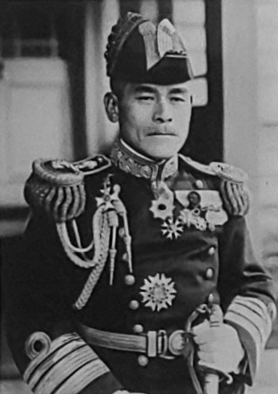 今村信次郎は大日本帝国海軍中将